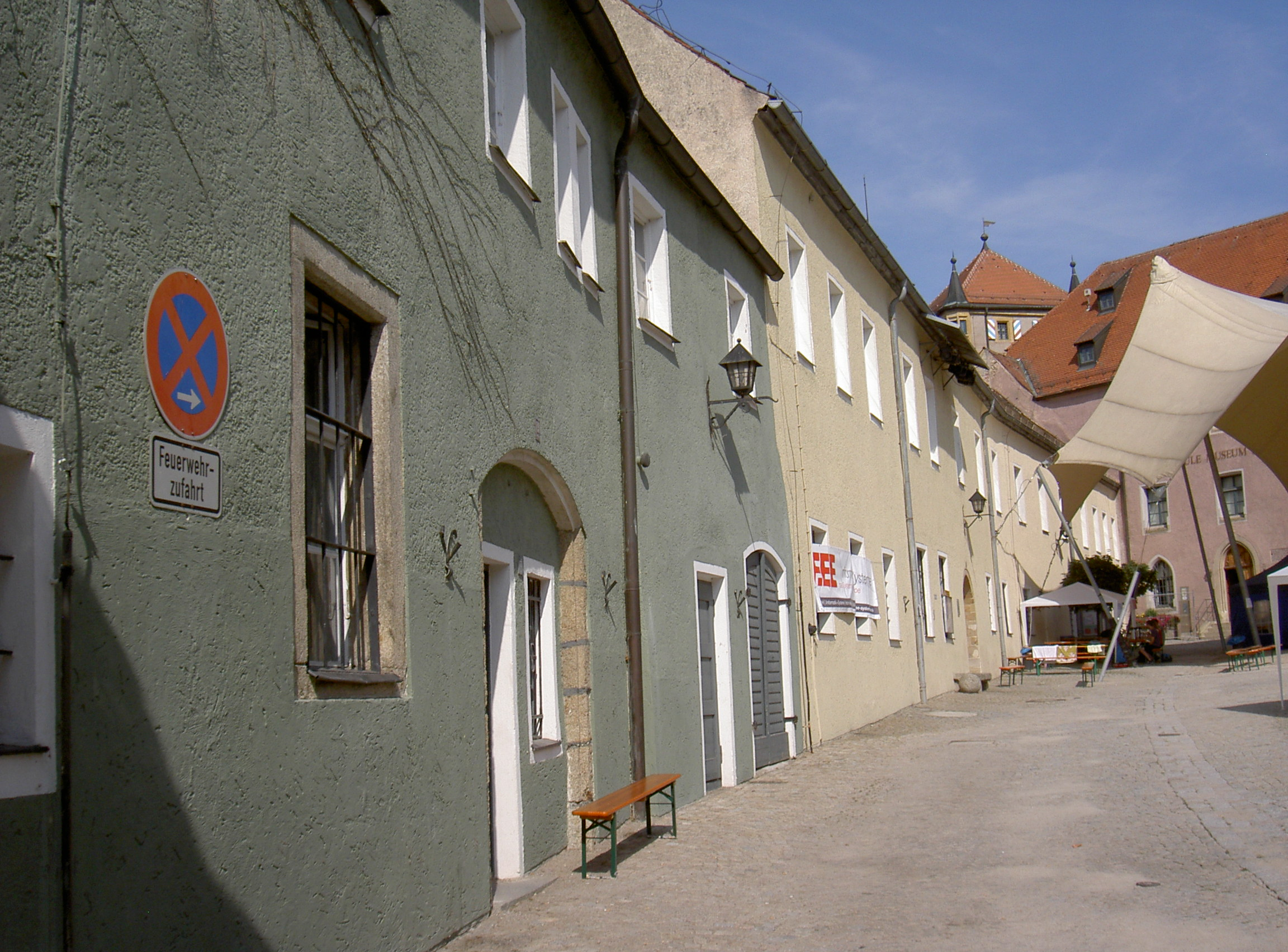 Neunburg vorm Wald, Im Berg 19